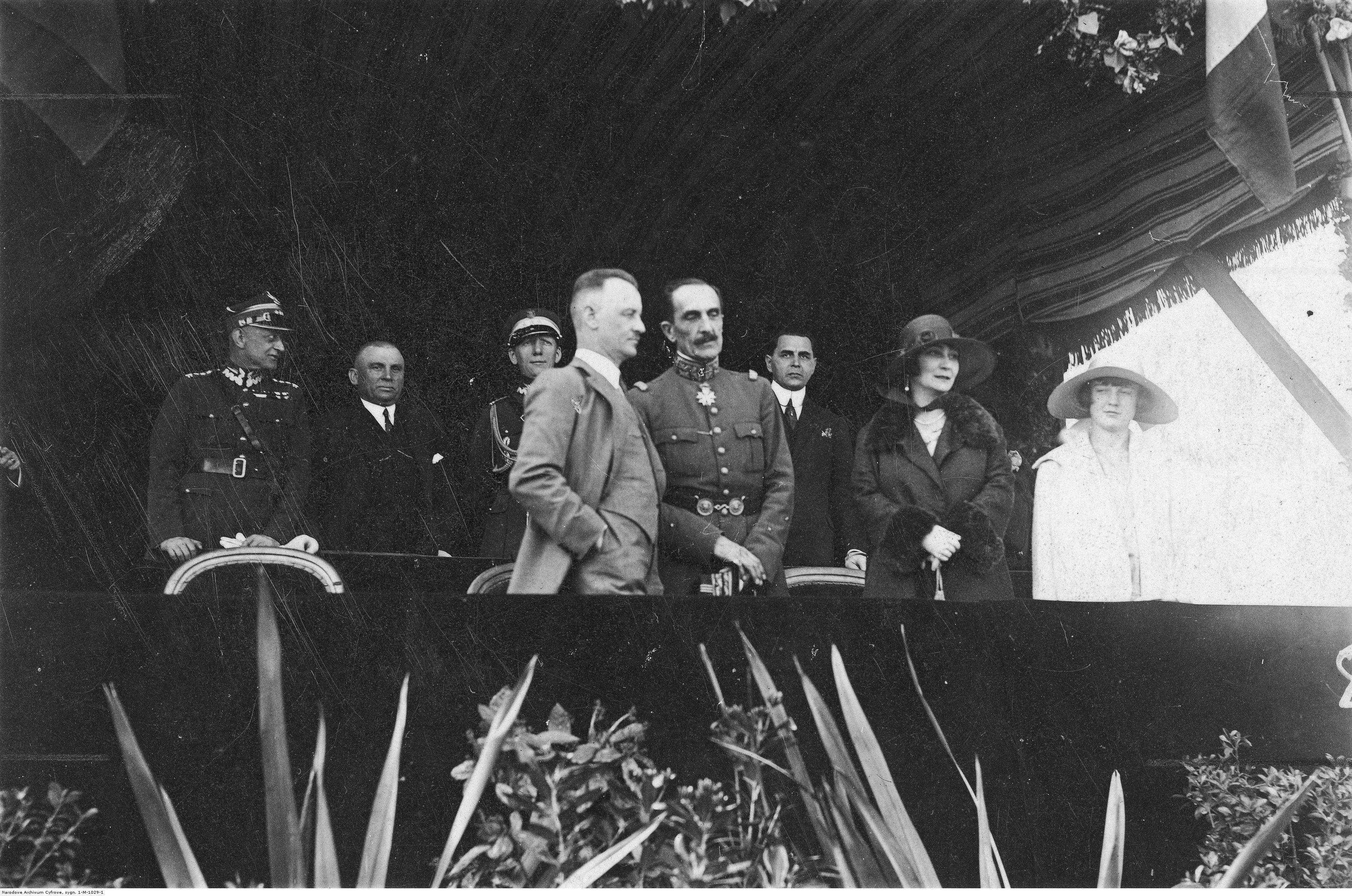 Międzynarodowy Konkurs Hippiczny w Nicei; maj 1925 r. Stoją na trybunie honorowej od lewej: płk Rawicz, płk Kukowski, płk Julian Kleeberg, gen. Władysław Sikorski (stoi bokiem), gen. Tinan, konsul RP Leon Stachiewicz, żona generała Sikorskiego Helena i ich córka Zofia.